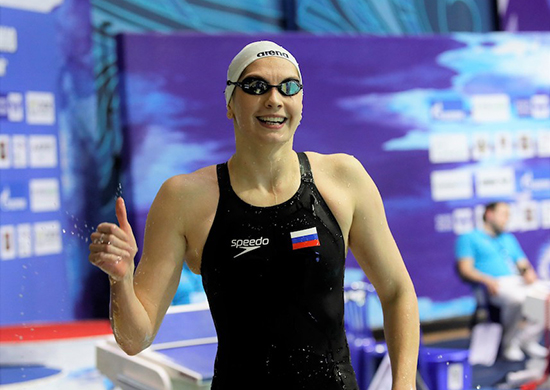 Пловчиха Светлана Чимрова